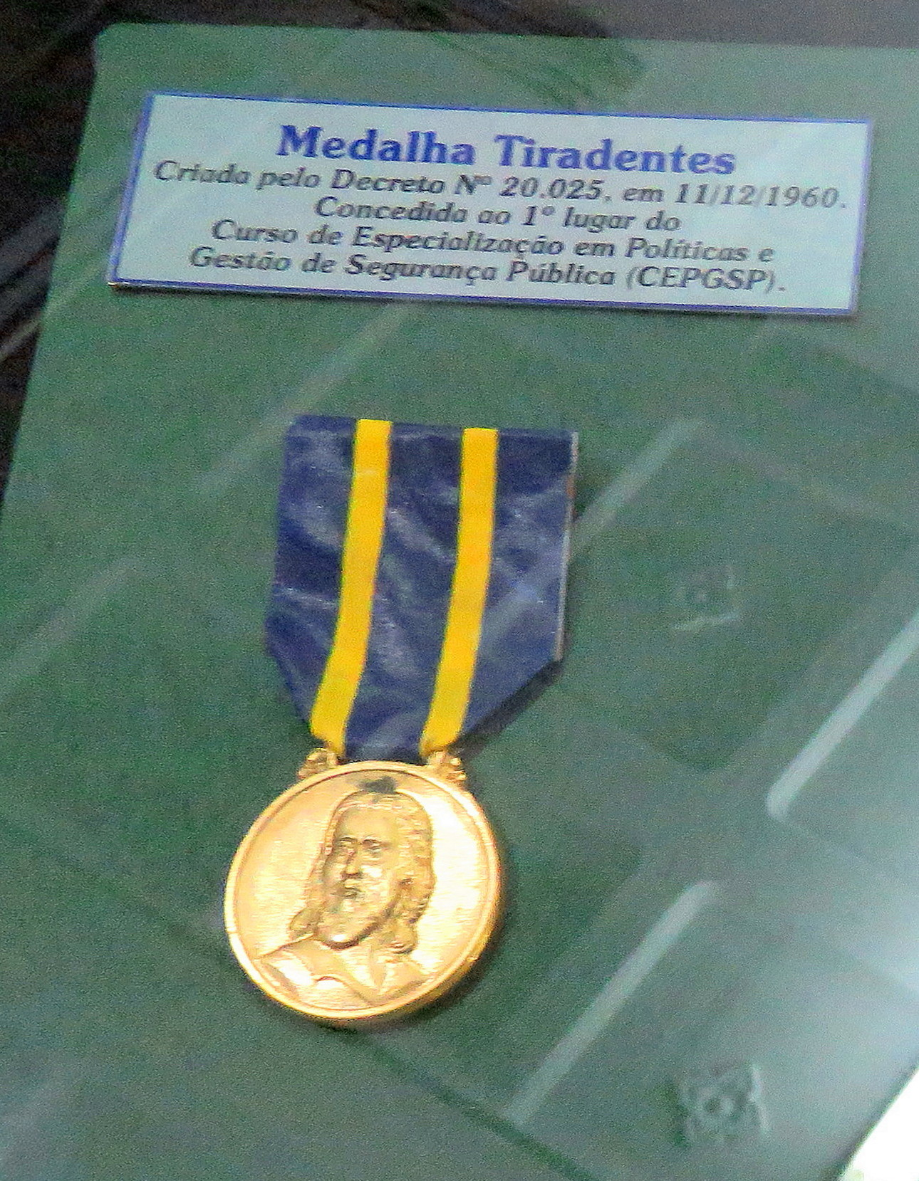 Medalha Tiradentes